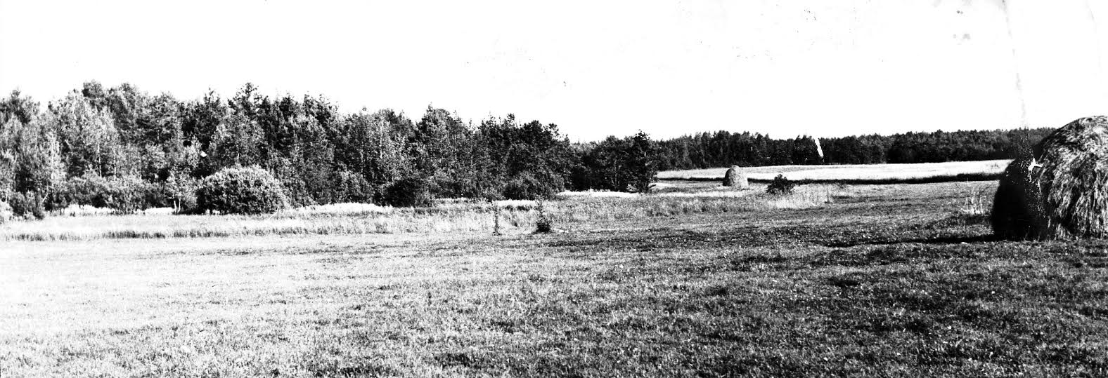 Деревня Потлово Сычевского района Смоленской области, уничтоженная немцами в 1941 г. Фотография из архива Т.А.Бормотовой (Вороновой), сделана в 1966 г. родившимся в этой деревне фотокорреспондентом РАТАУ — ТАСС А.Т.Бормотовым.